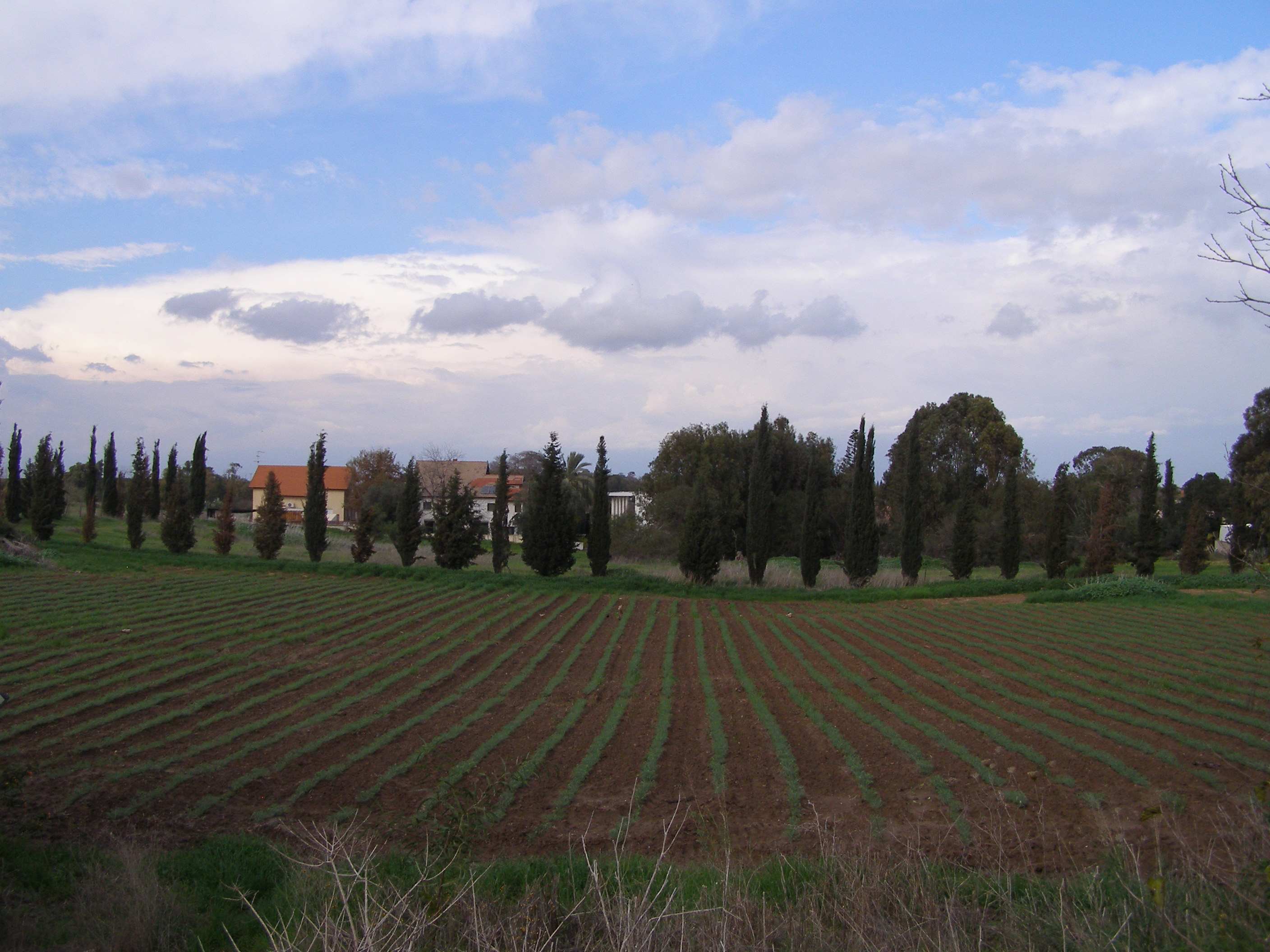 Sdema